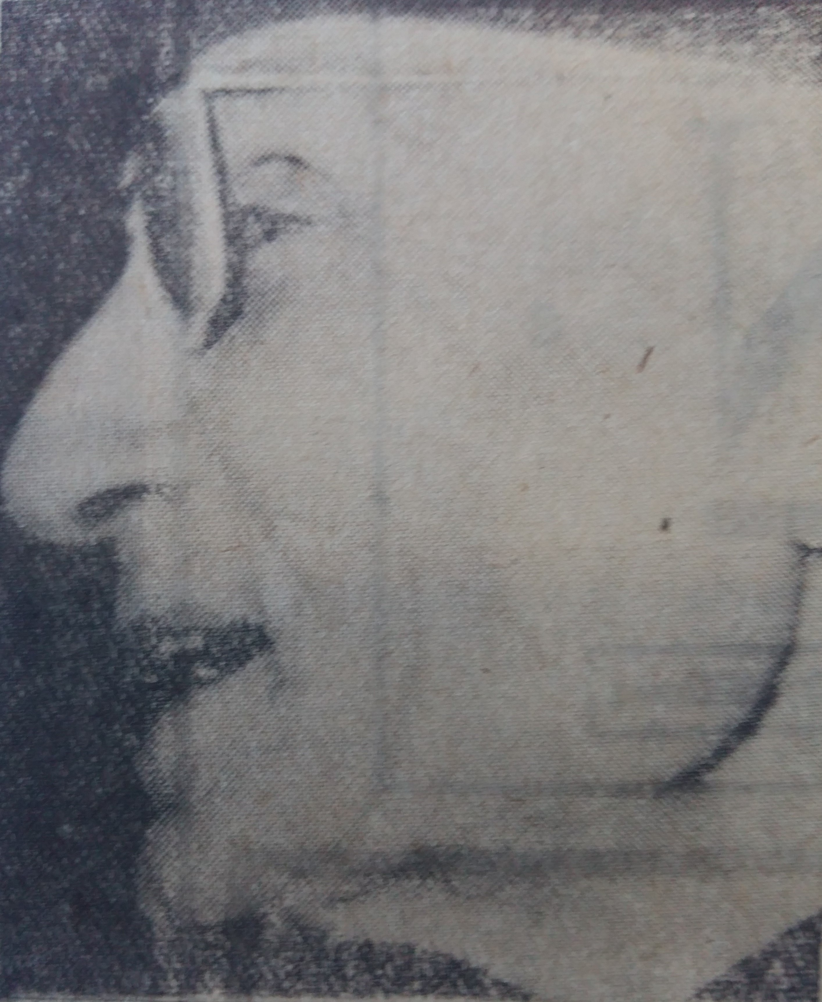 hassen hosni abdelwaheb